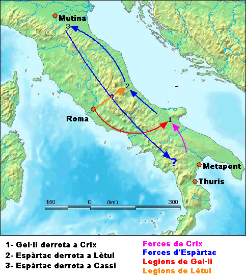 espartac segon plutarc